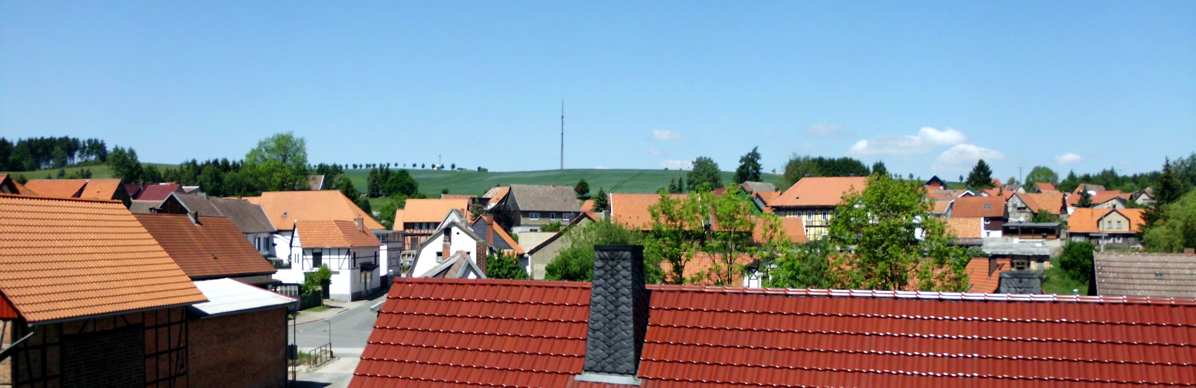 Blick auf Güntersberge, Stadt Harzgerode